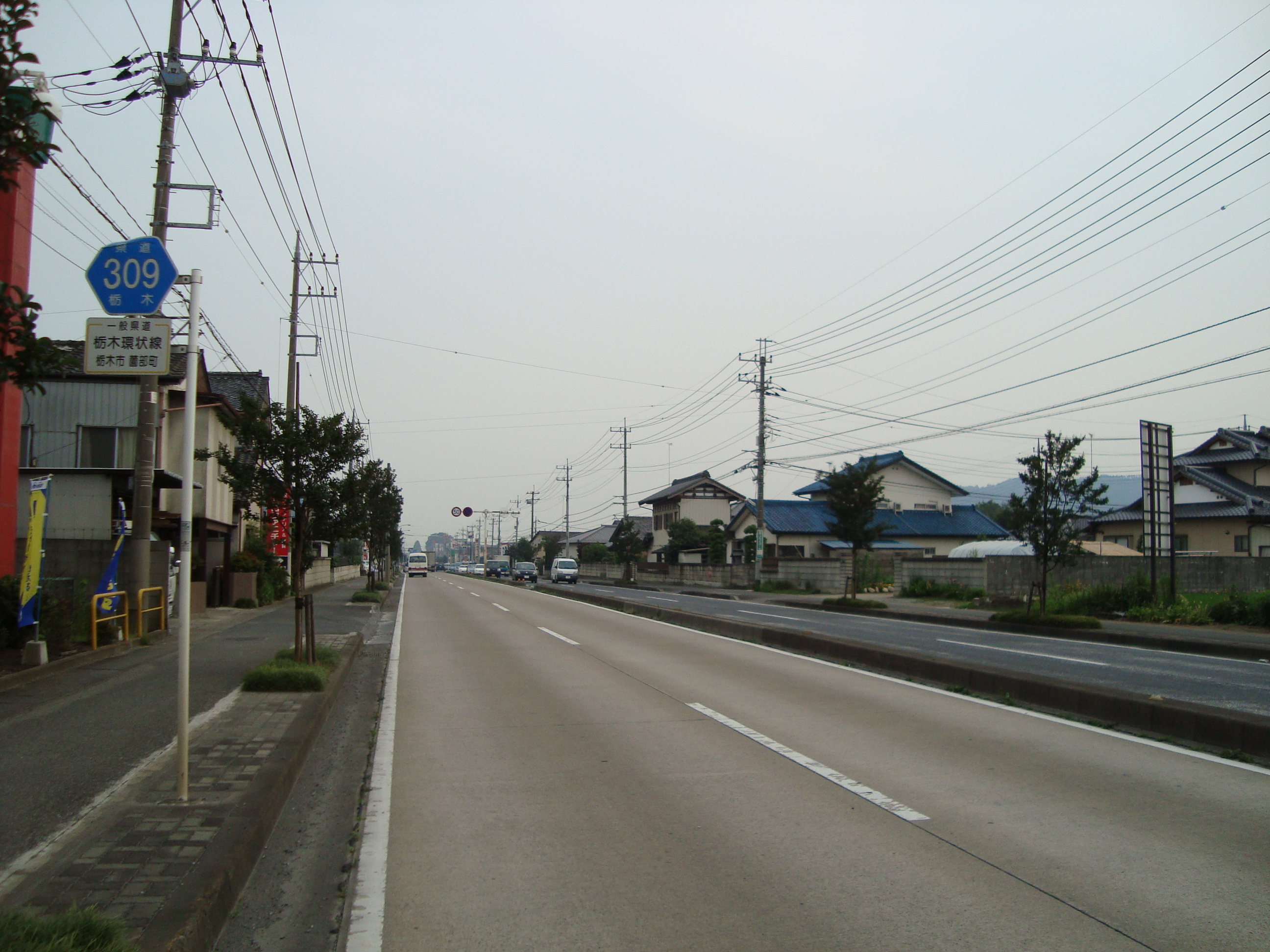 栃木県道309号栃木環状線 栃木県栃木市園部町